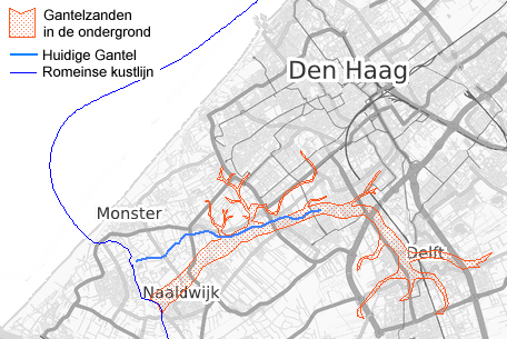 Gantelzanden in de ondergrond van Zuid Holland. (After Bloemers 1978 and NITG 1998)